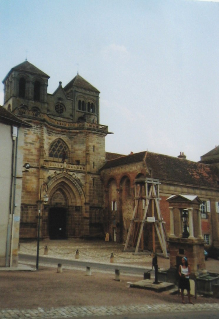 Abdij van Souvigny